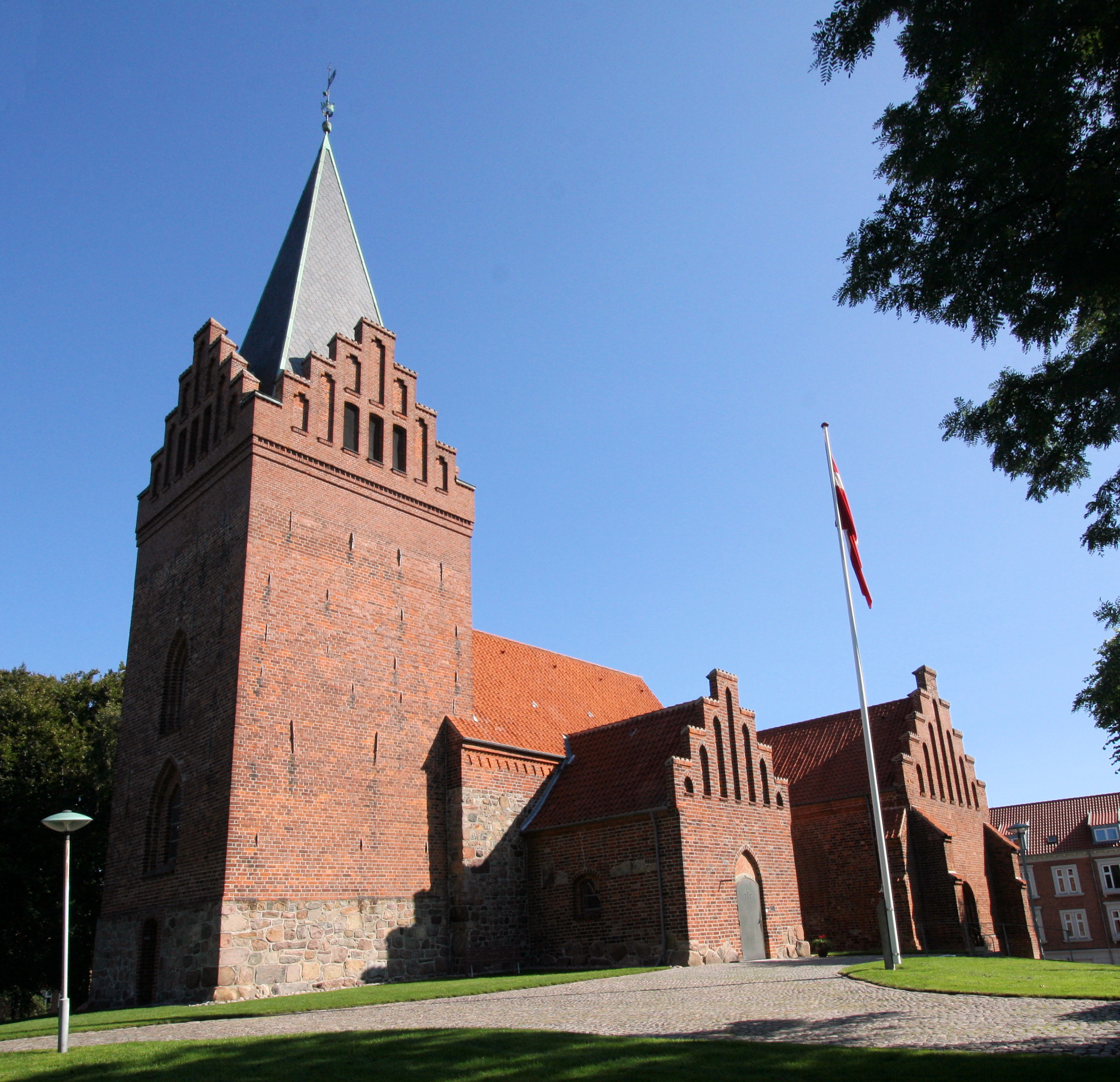 Sankt Peders Kirke in Slagelse, Denmark. From southwest